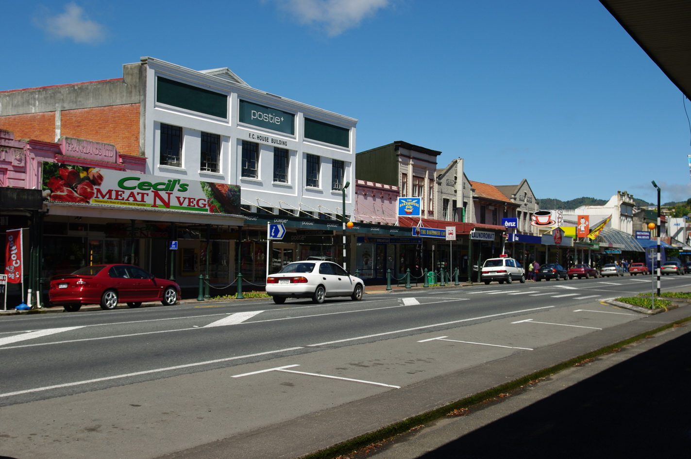 Taumarunui Hauptstraße, Neuseeland